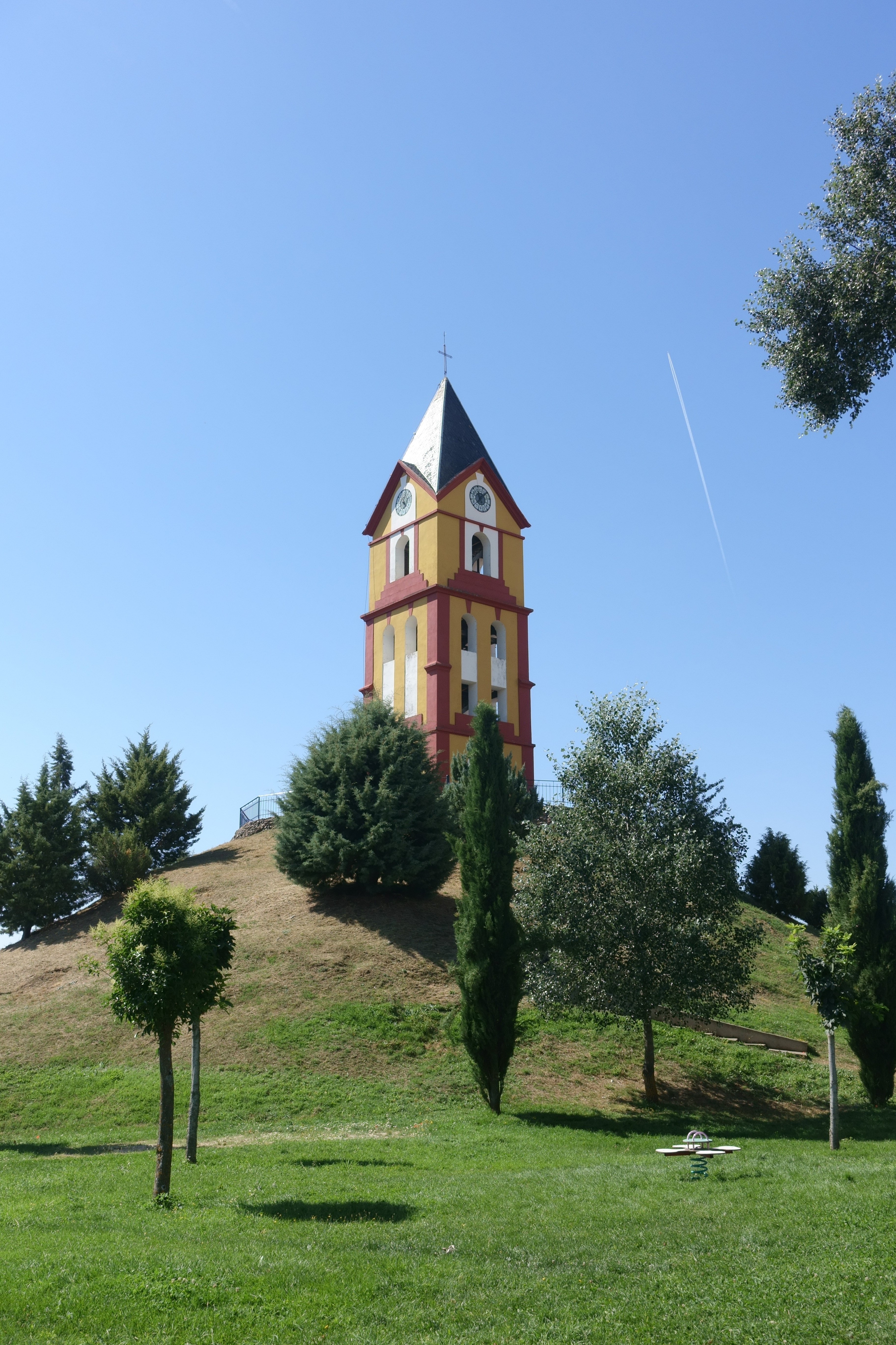 Torre de Almanza (León, España).